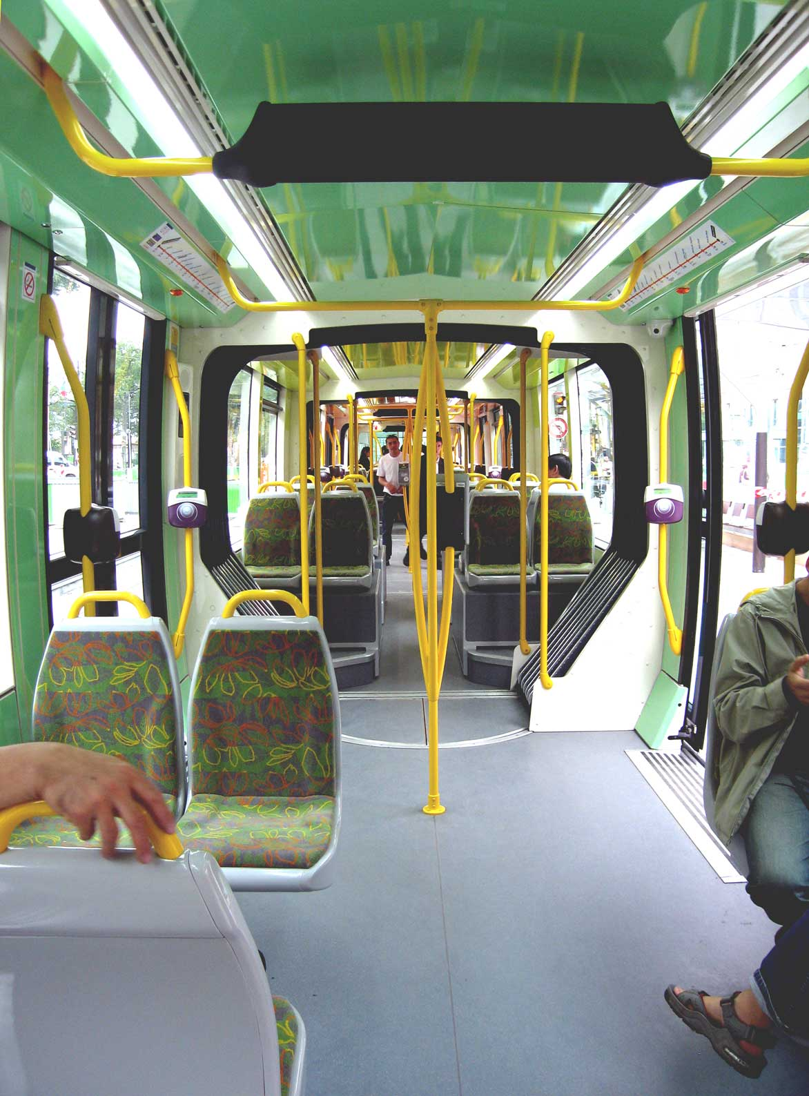 Description : Ligne tramway T3 Rame Citadis 402 Vue intérieure Porte d'Ivry, Journées du Patrimoine en présentation statique Lieu : Paris, France Date : Septembre 2006 Auteur : Pline photo personnelle